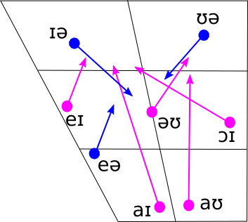 English diphtongz